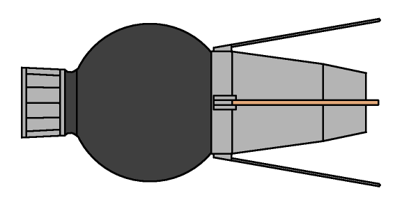 日本初の人工衛星「おおすみ」です。 First Japanese artificial satellite Ohsumi (Osumi,oosumi).